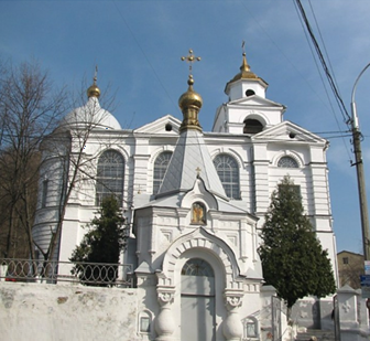 Крестовоздвиженская церковь в Киеве.